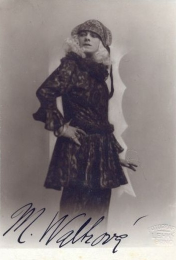 Marie Waltrová (1897–1978), česká herečka.